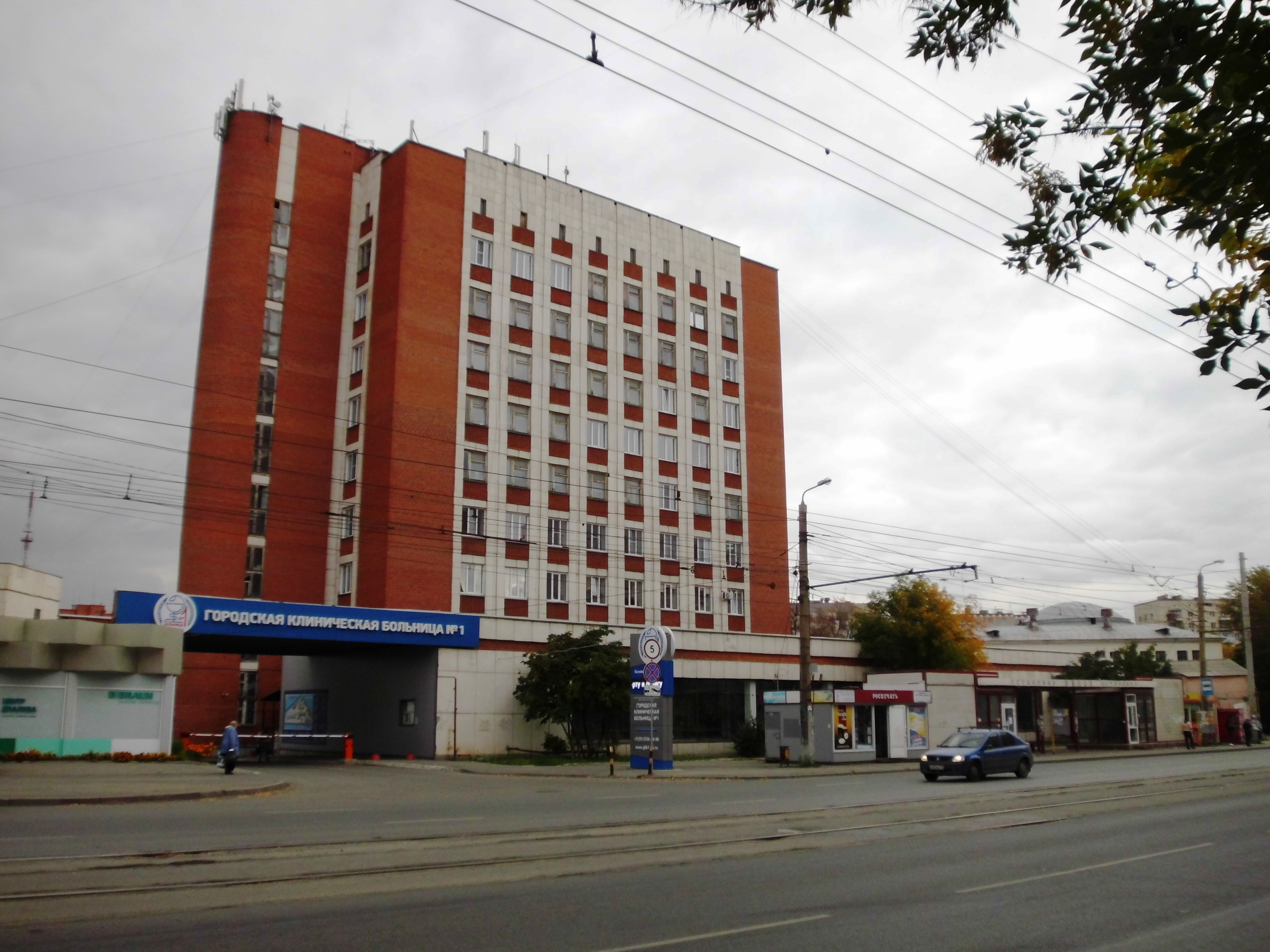 Городская клиническая больница № 1, корпус 10 (терапевтический, введён в эксплуатацию в 1998 г.). Справа видны купол и крыша корпуса 1 (самого первого в составе больницы, 1880 г.). Город Челябинск, ул. Воровского, 16. Вид со стороны проезжей части Свердловского проспекта.